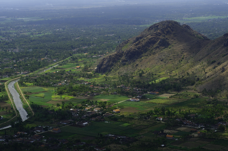 Sanggrahan village, Boyolangu District, Tulungagung Regency, East Java Province, Indonesia